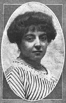 Fotografía de la escritora española Carmen Karr publicada en 1913 con motivo de la fundación por ella en Barcelona de la residencia de estudiantes El Hogar